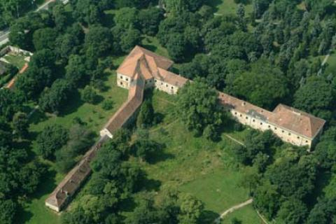 Sereď, Slovakia, aerial photography